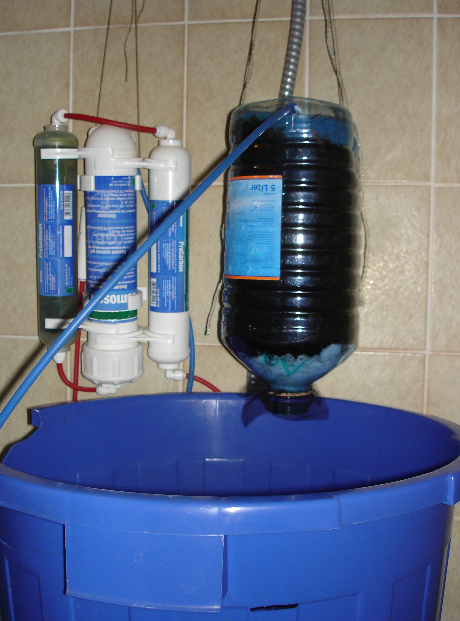 Wasseraufbereitung für Schwarzwasserfische: Umkehrosmoseanlage + "Torfkanone"